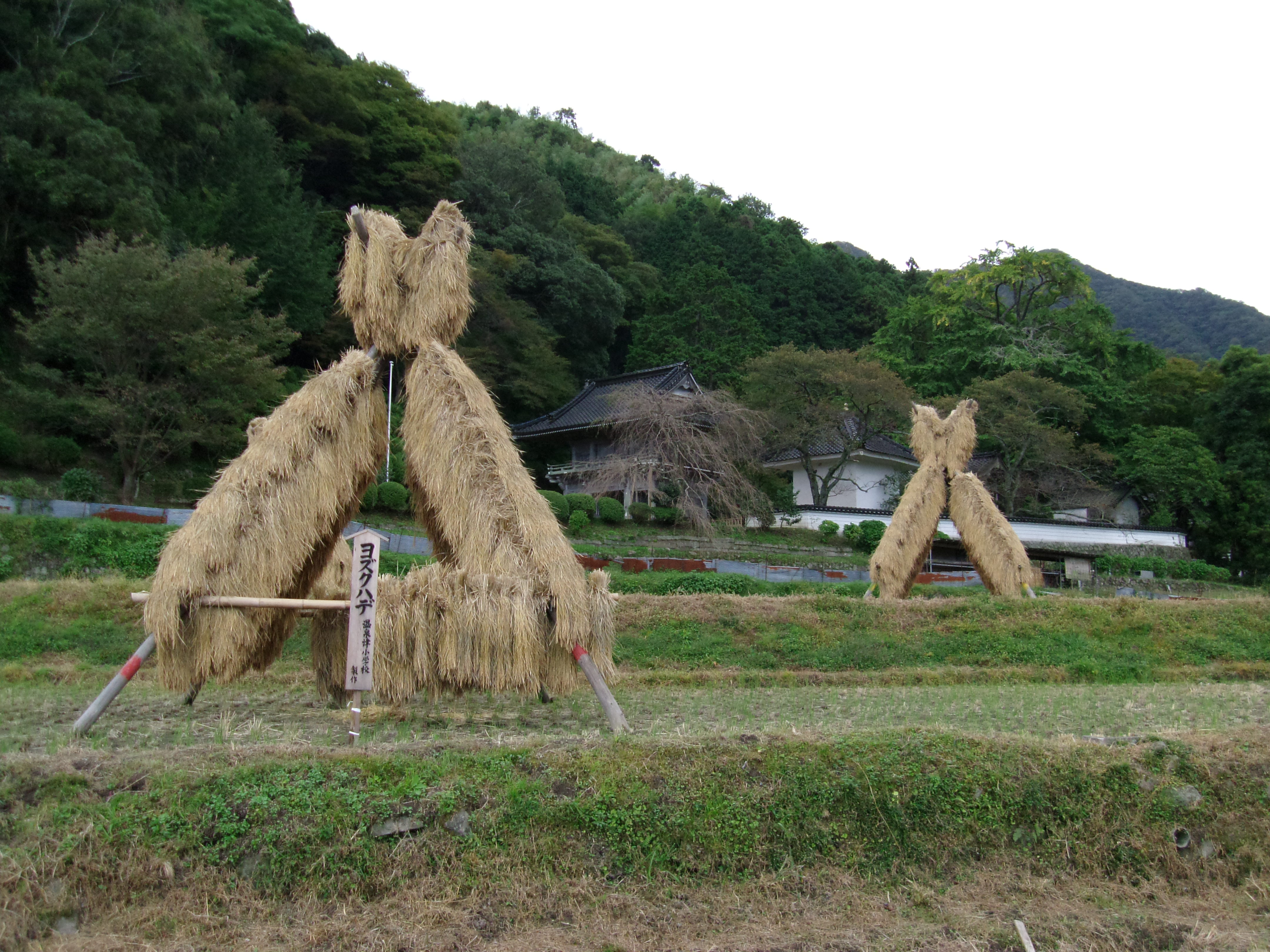 世界遺産「石見銀山」の構成資産である銀山街道温泉津沖泊道 西田のヨズクハデ